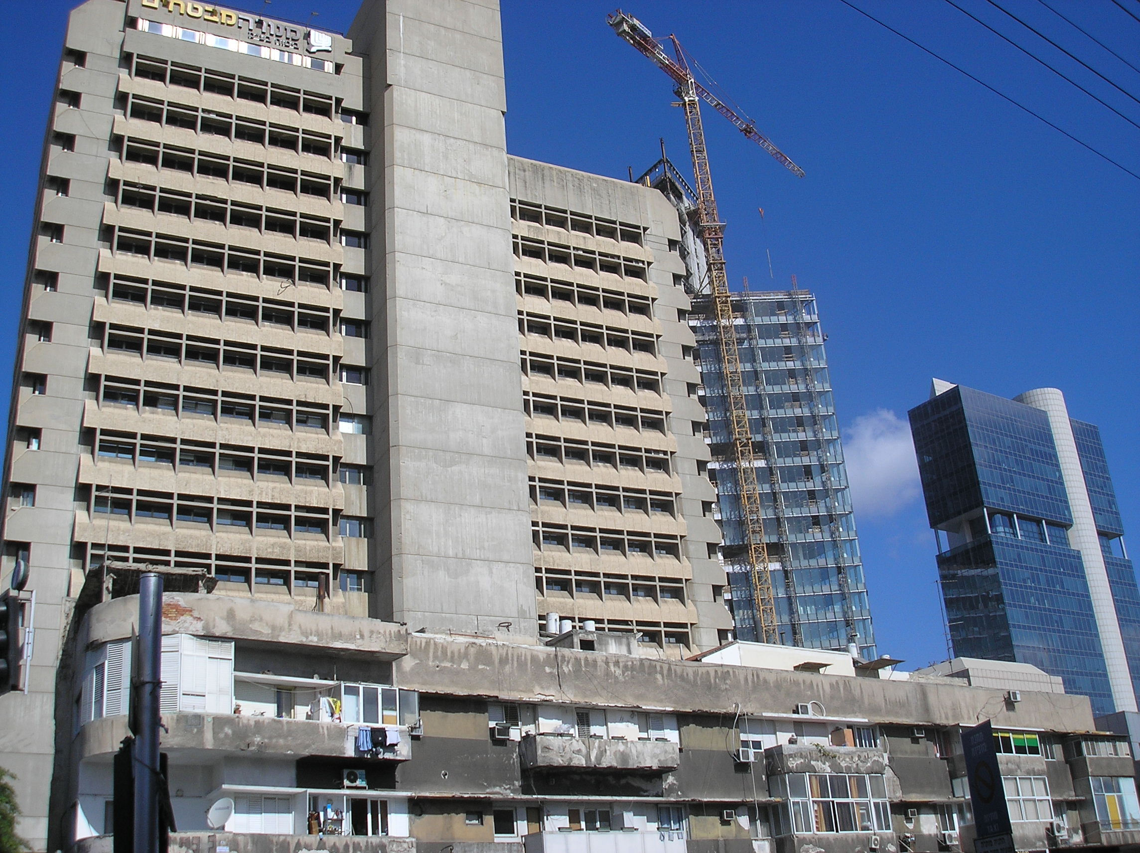 Allenby Street